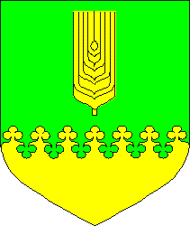 Oisu valla vapp